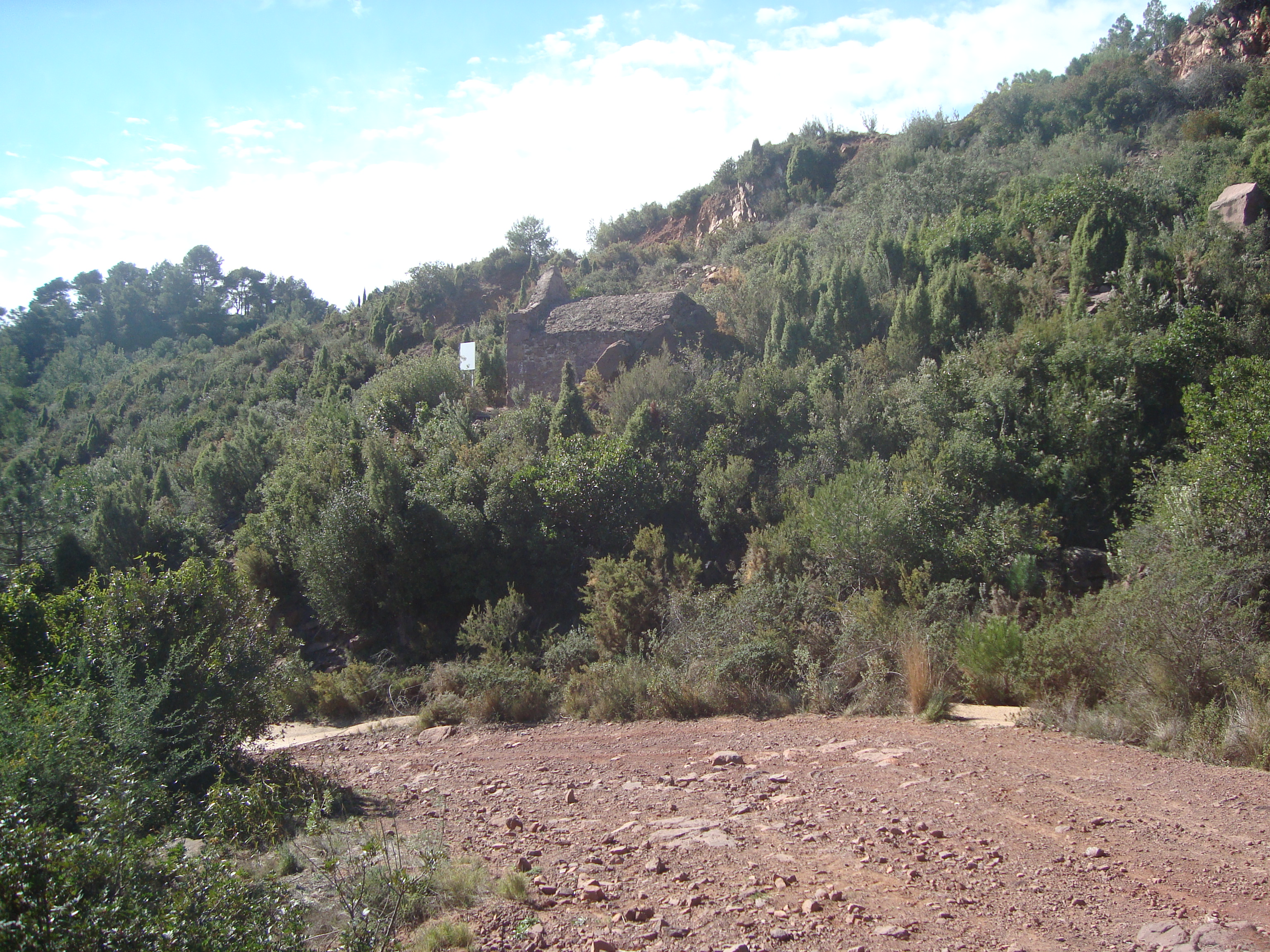 Desierto de las Palmas, Parque Natural del Desierto de Las Palmas en Castellón This is a photography of a Site of Community Importance in Spain with the ID: ES5221002. Natura2000 entry, EEA entry